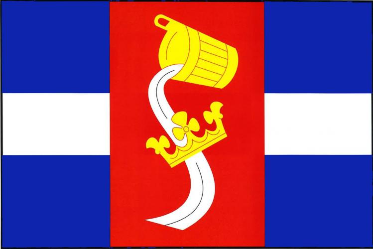 vlajka, Vysočany, okres Znojmo